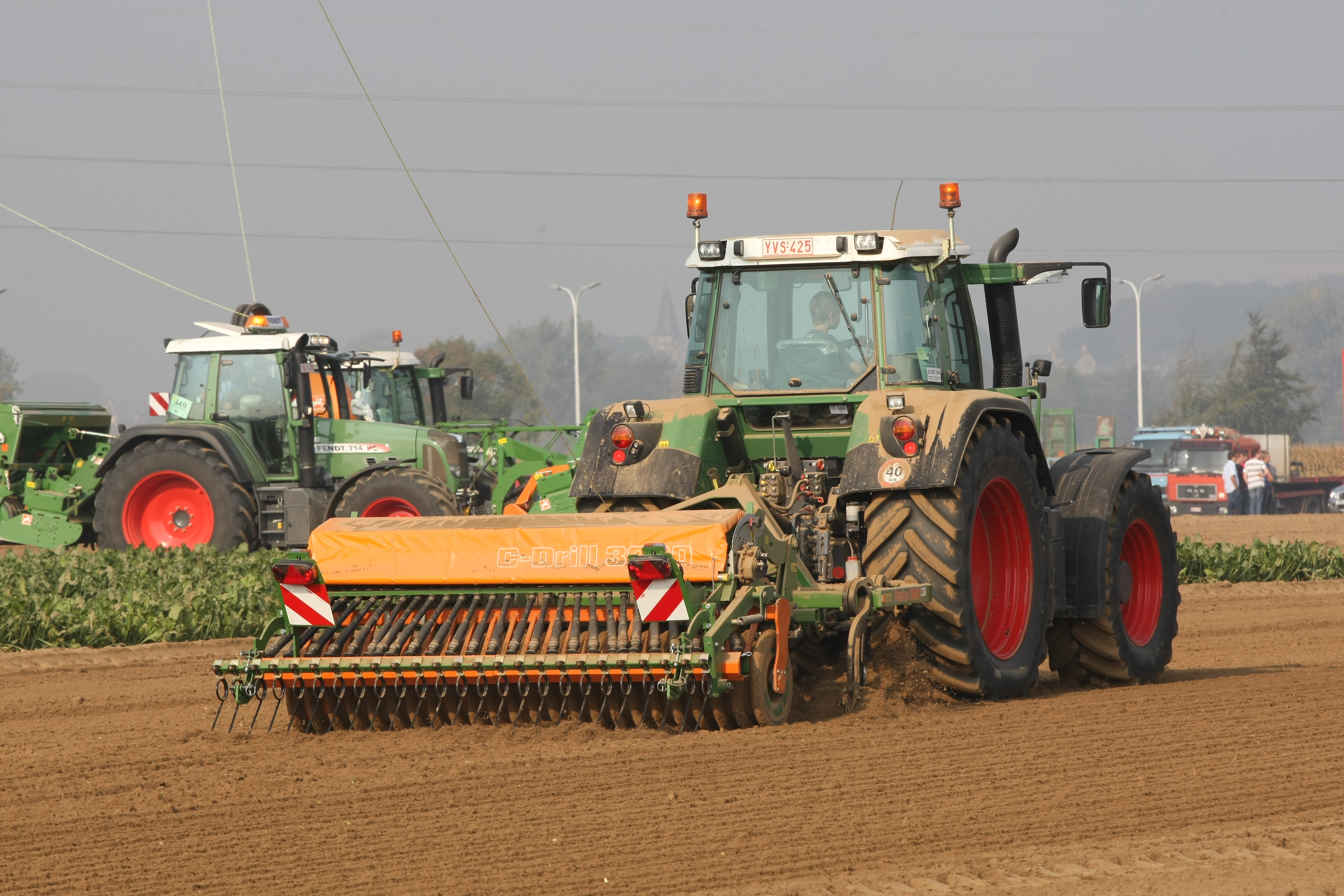 Mechanische Sämaschine C-Drill 3000 von Amazone hinter einem Fendt-Traktor auf den Werktuigendagen 2009 in Belgien